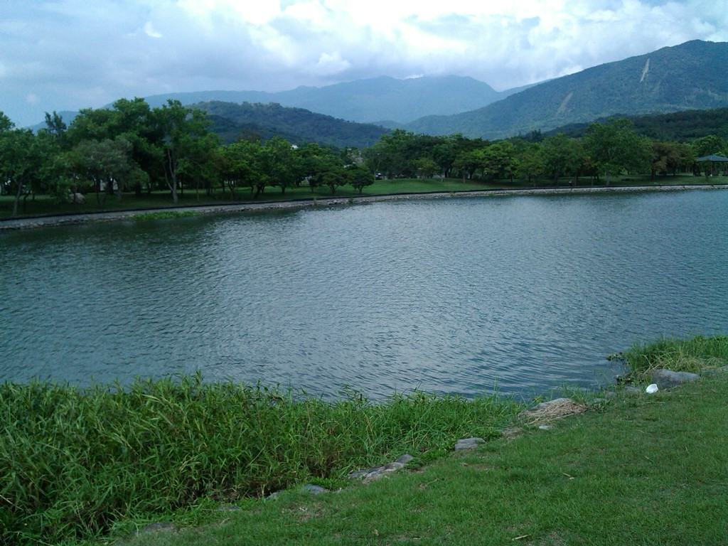 位於台東縣池上鄉市區東側的池塘